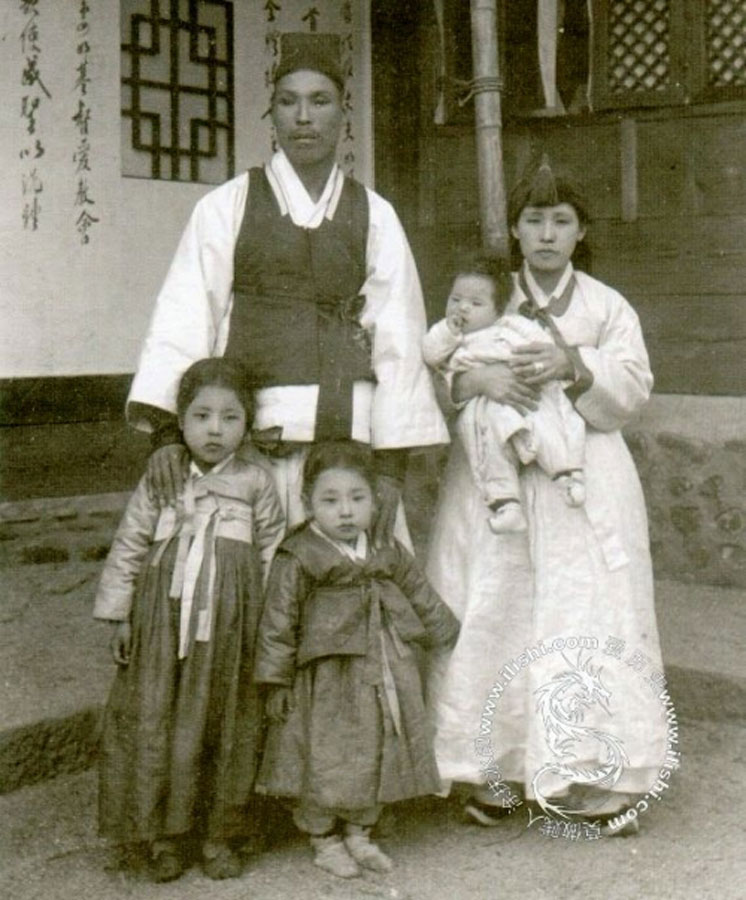 中文（香港）: 19世紀末的朝鮮家庭